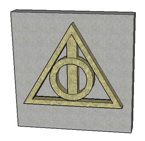 deathly hallow symbol - Symbole des reliques de la mort